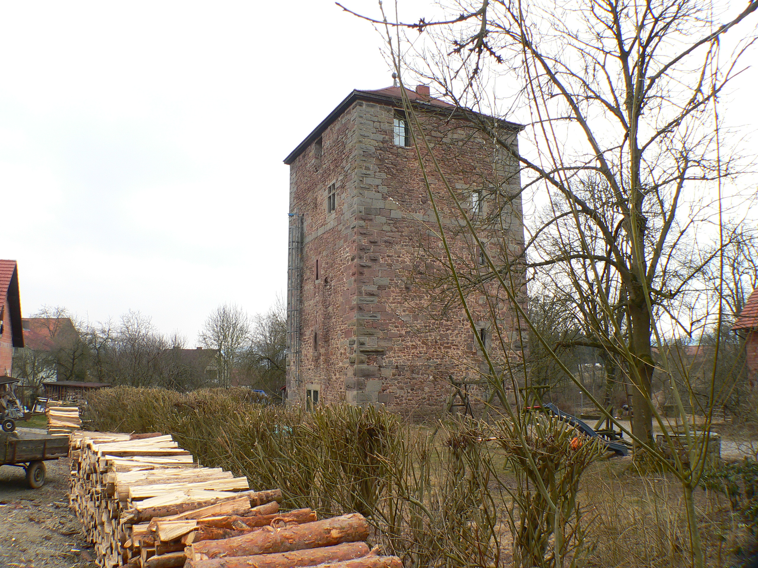 Burg Holzheim (Dicker Turm) in Haunetal-Holzheim, Hessen, Regierungsbezirk Kassel, Landkreis Hersfeld-Rotenburg